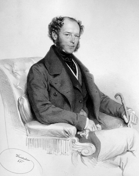 Louis Charles de Blacas d´Aulps (1815-1866), Herzog. Kunstsammler, Numismatiker. Lithographie von Josef Kriehuber, 1851